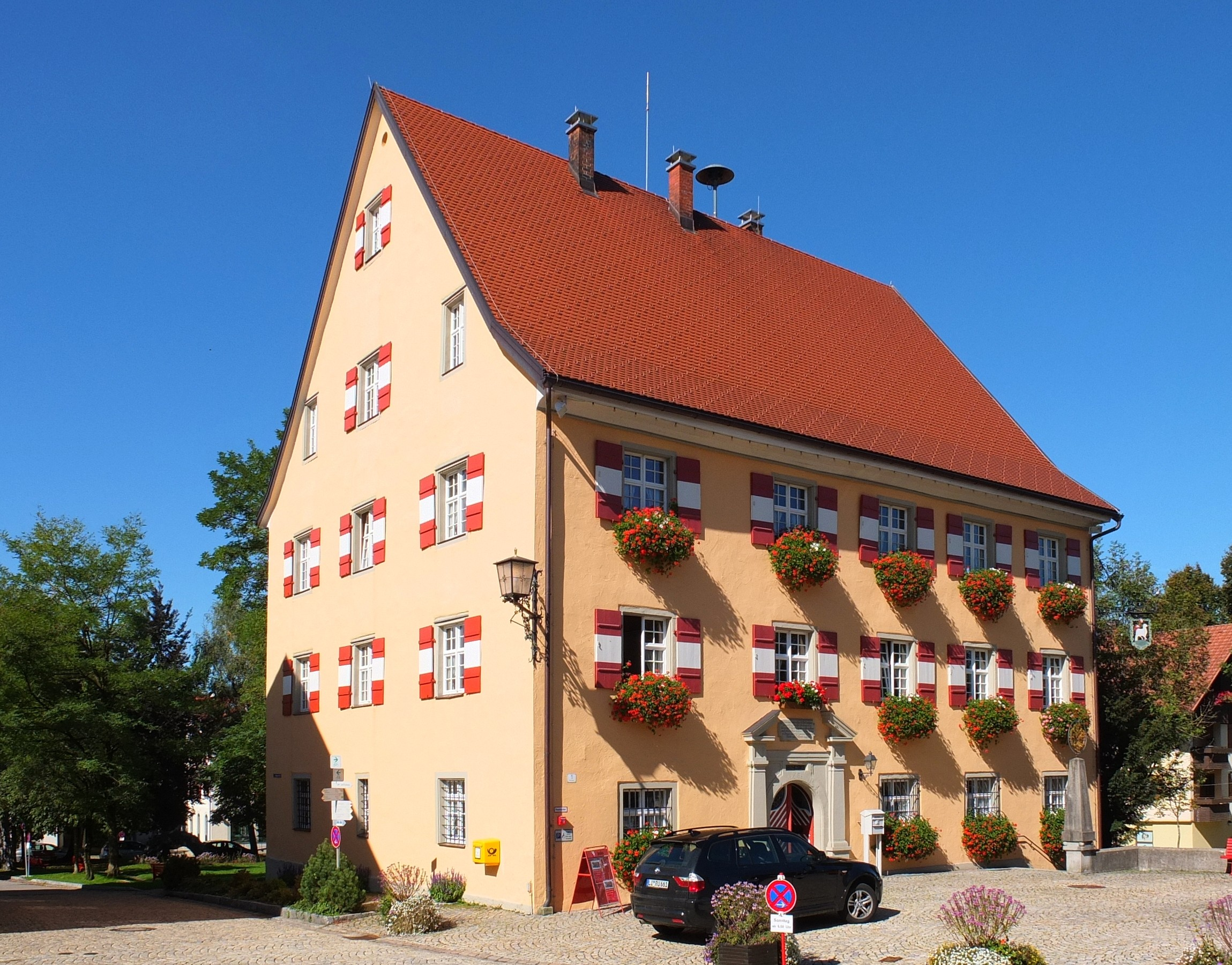 Rathaus (ehem. Amtshaus) von Weiler im Allgäu (Weiler-Simmerberg, Bayern, Deutschland)This is a photograph of an architectural monument.